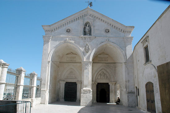 Santuario di San Michele nel Gargano dall'album personale. __Giuseppe Bruno__ (msg) 22:47, 16 nov 2009 (CET)